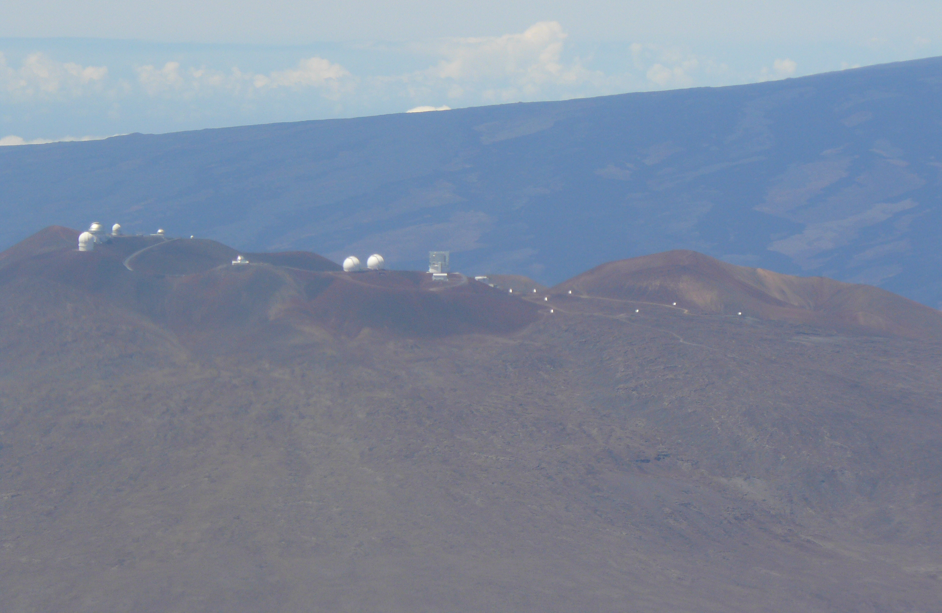 Observatoires du Mauna Kea. De gauche à droite, CFHT, Gemini North, UH 2.2, UKIRT, UH 0.6, IRTF, les 2 Keck, Subaru, le bâtiment et les 8 antennes du SMA. Derrière le Mauna Kea, le Mauna Loa.